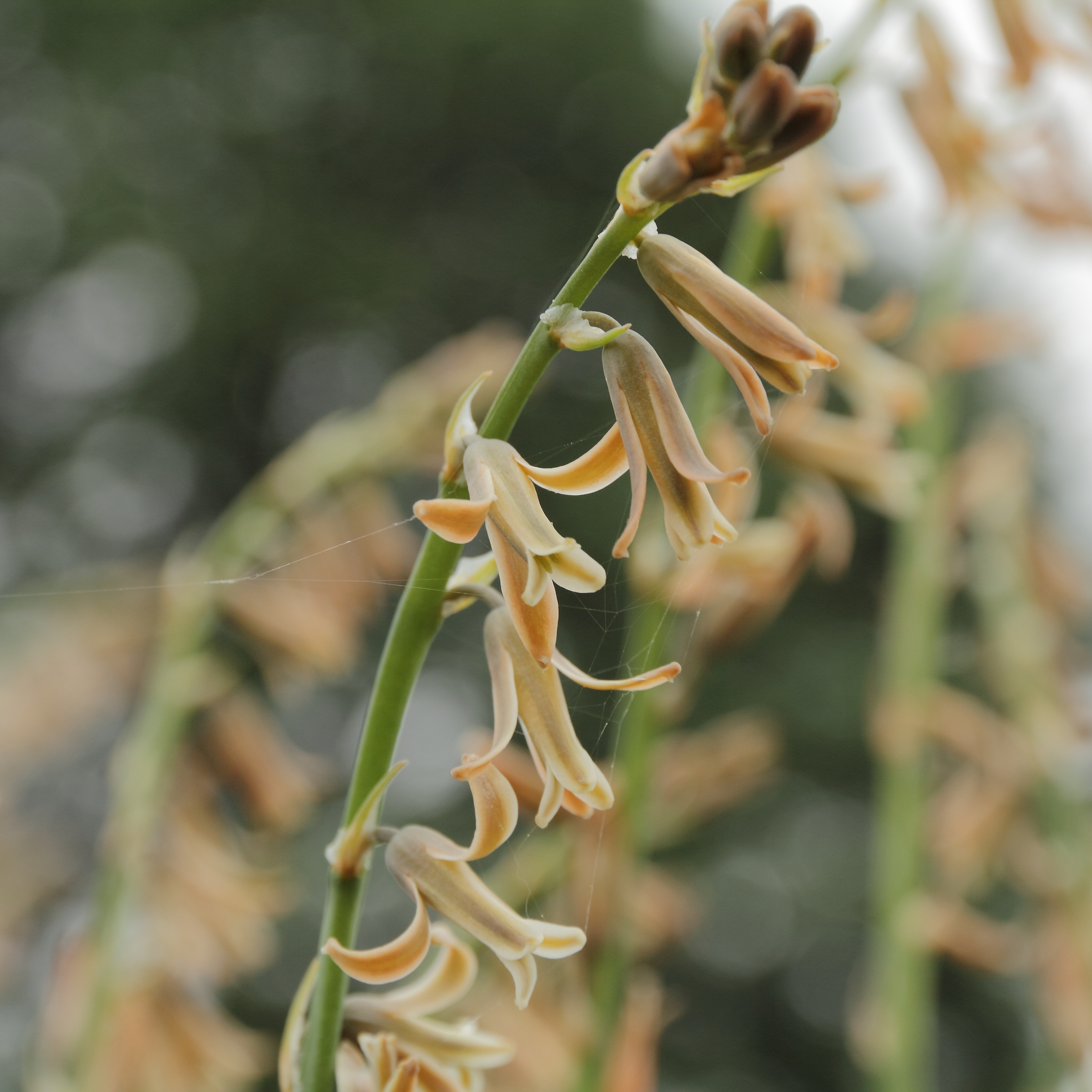 Dipcadi serotinum i Bergianska trädgården.